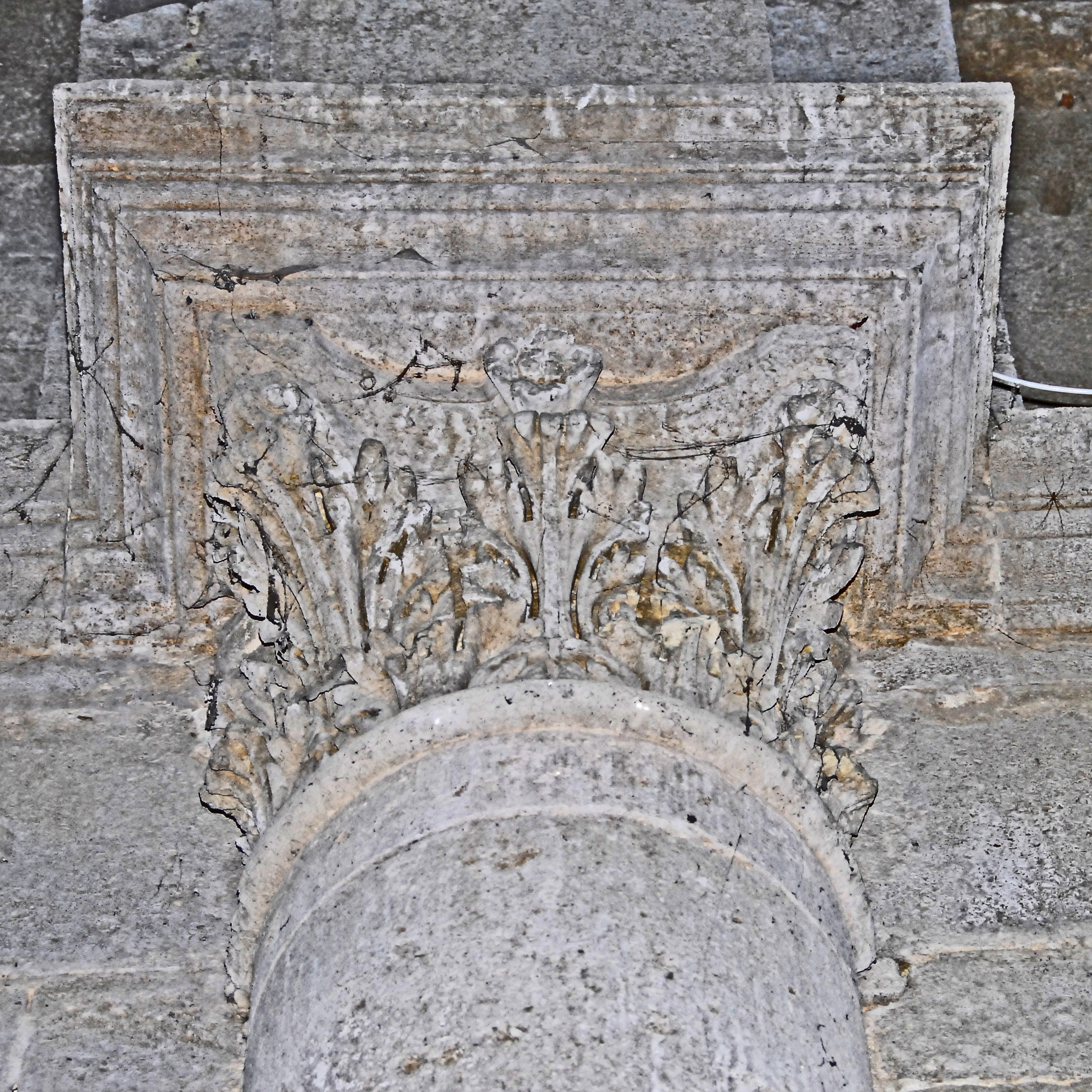 St-Pierre-et-St-Paul dr Maguelone, Kapitell über Empore